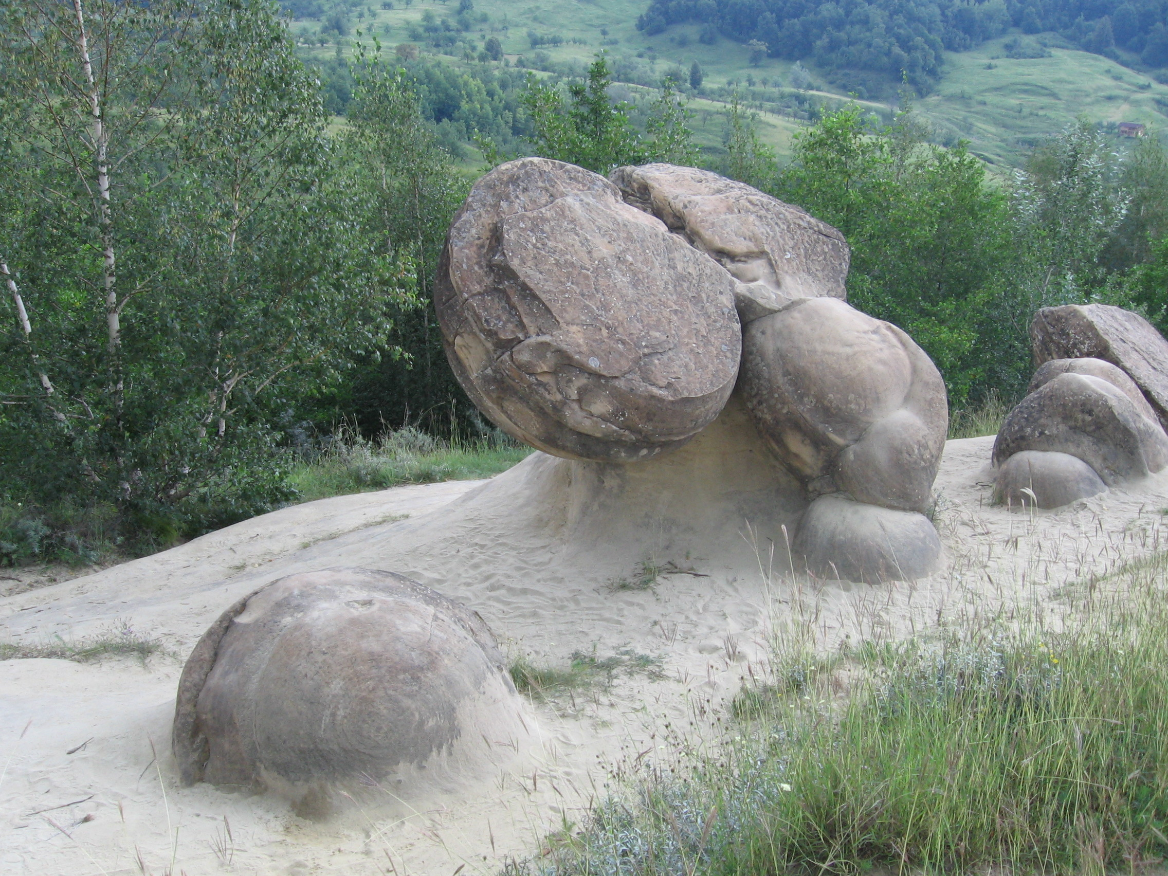 Báby z Ulmetu - kameny, které se po měkkém podleží posouvají o několik cm za rok.